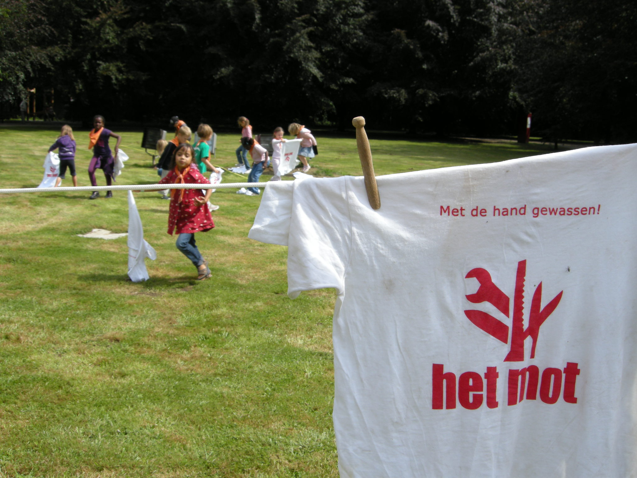 Wassen in het MOT